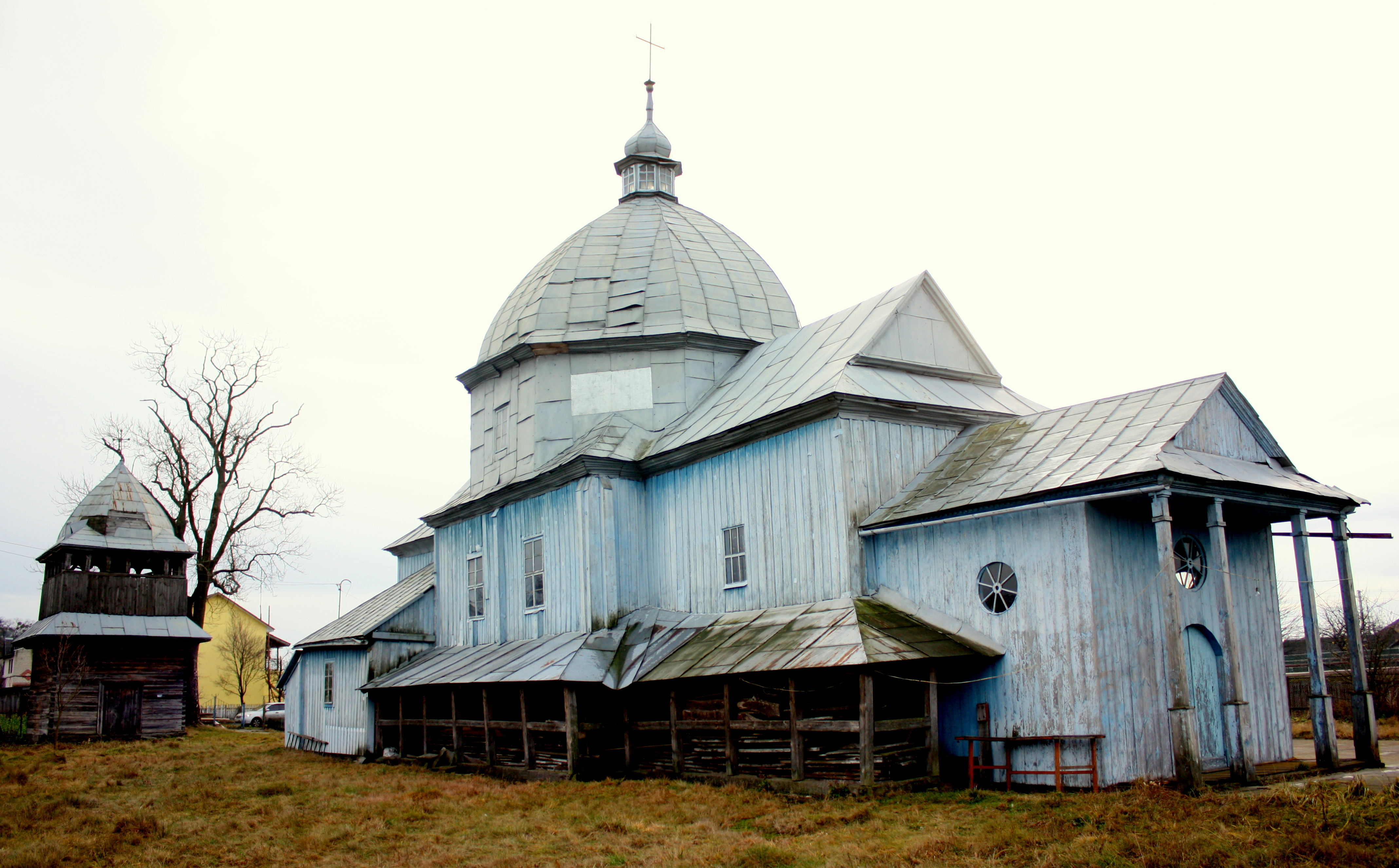 Церква Св. Миколая (дер.), Станіславчик